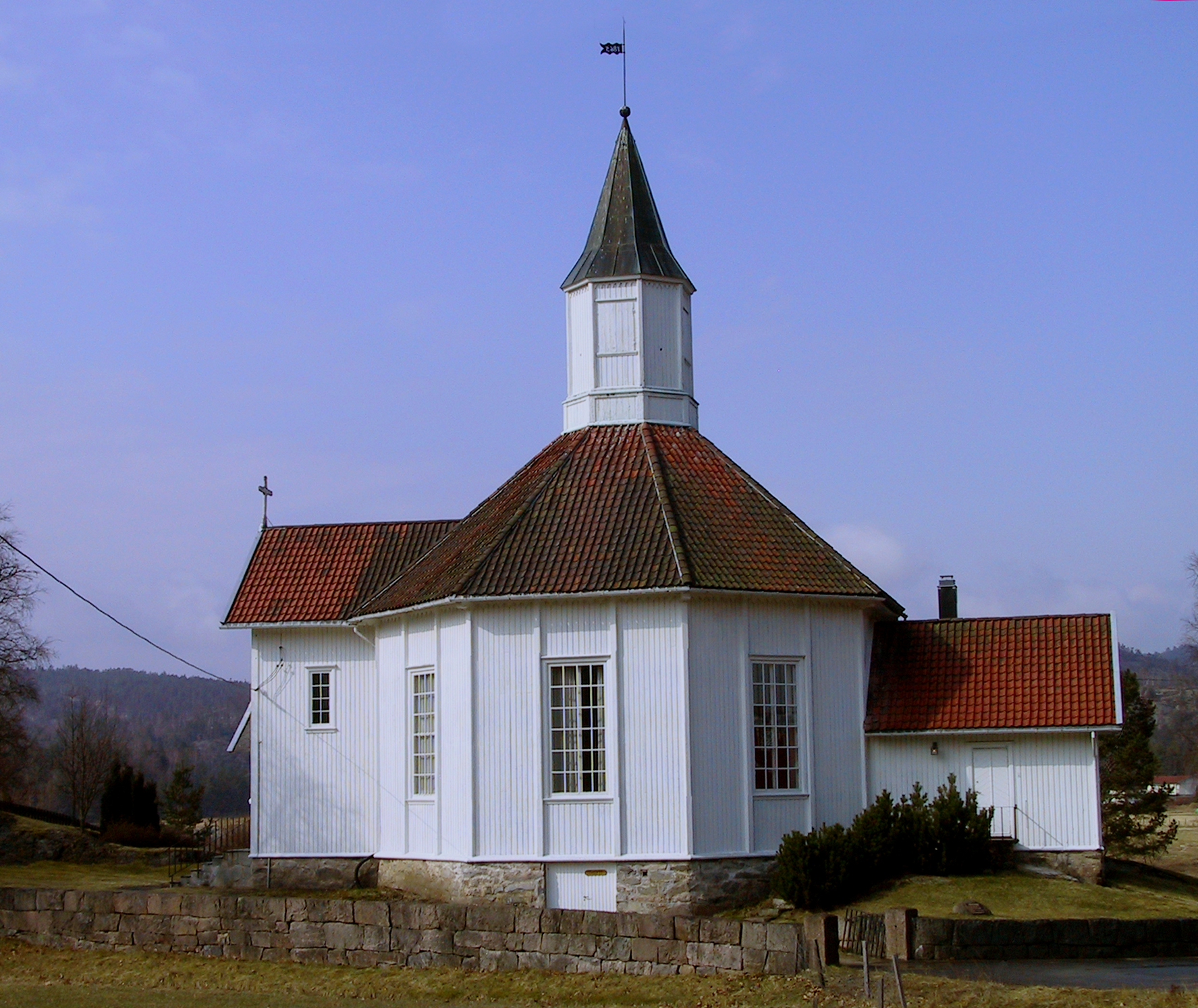 Herefoss kirke i Birkenes kommune i Aust-Agder